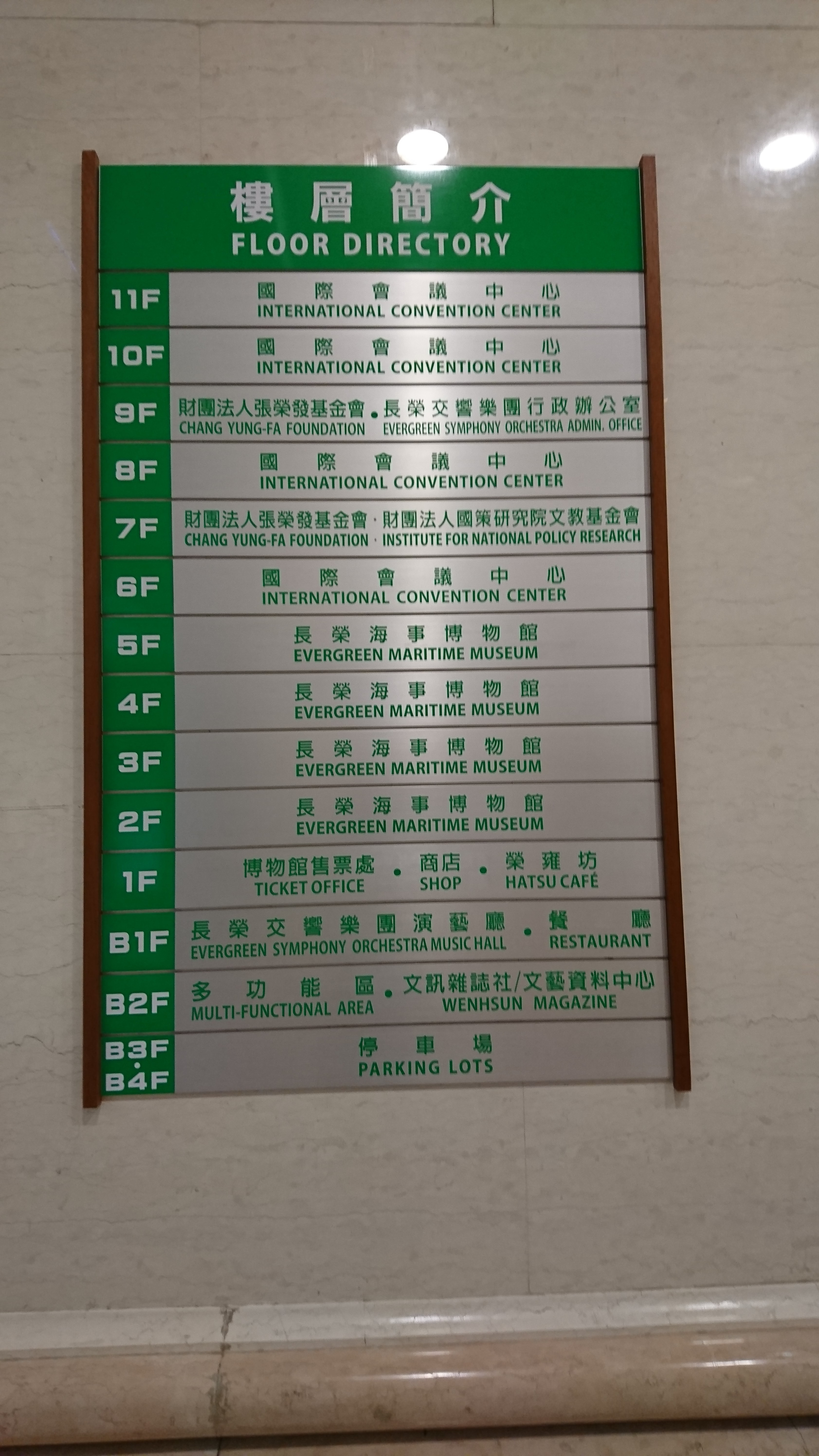 張栄発基金会ビルにおけるフロア説明。